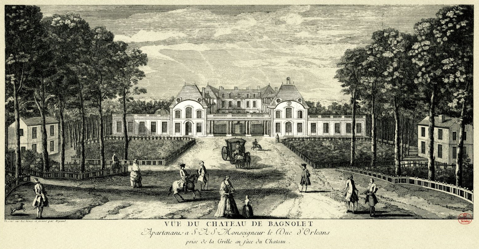 Le château, vu des grilles